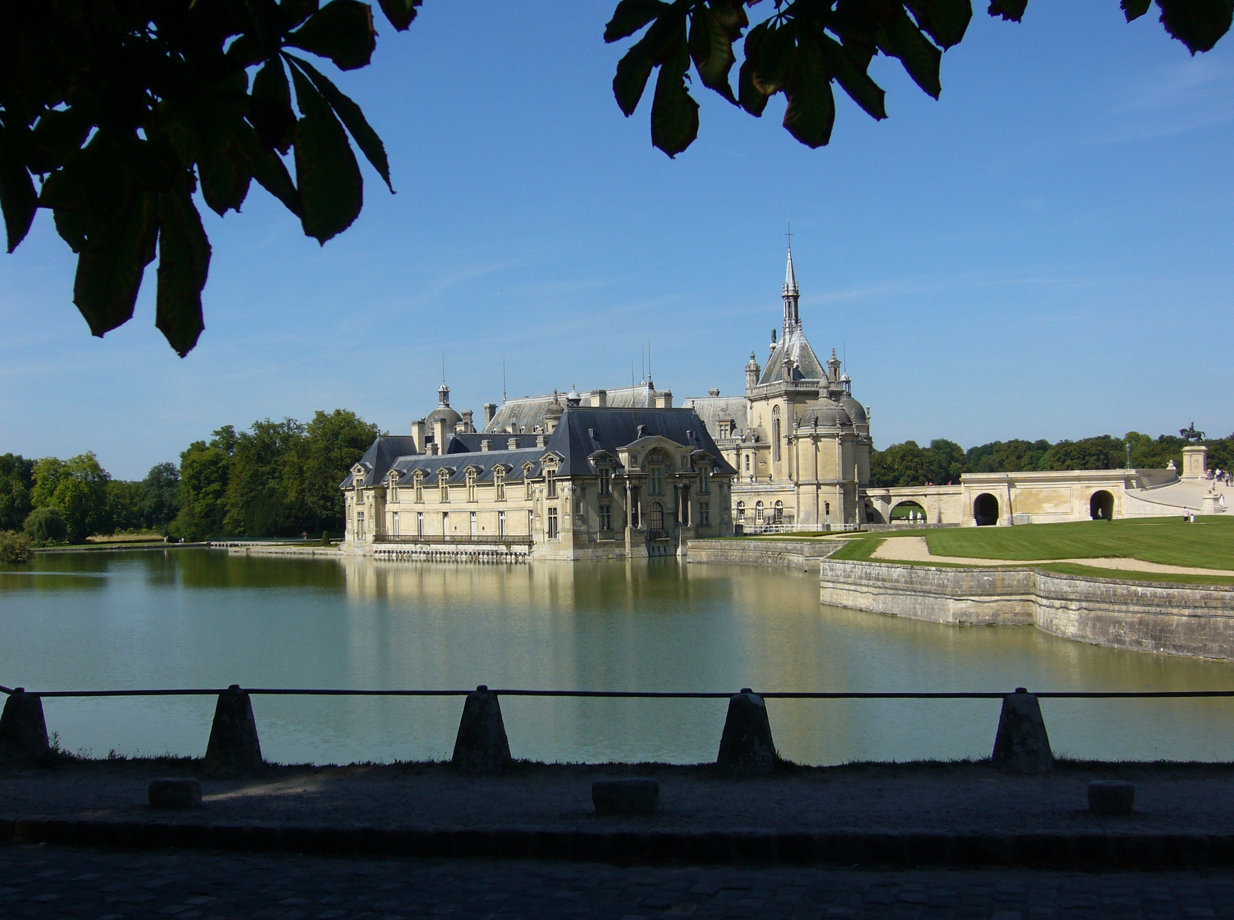 Château de Chantilly (Oise, France) This building is en partie classé, en partie inscrit au titre des Monuments Historiques. .